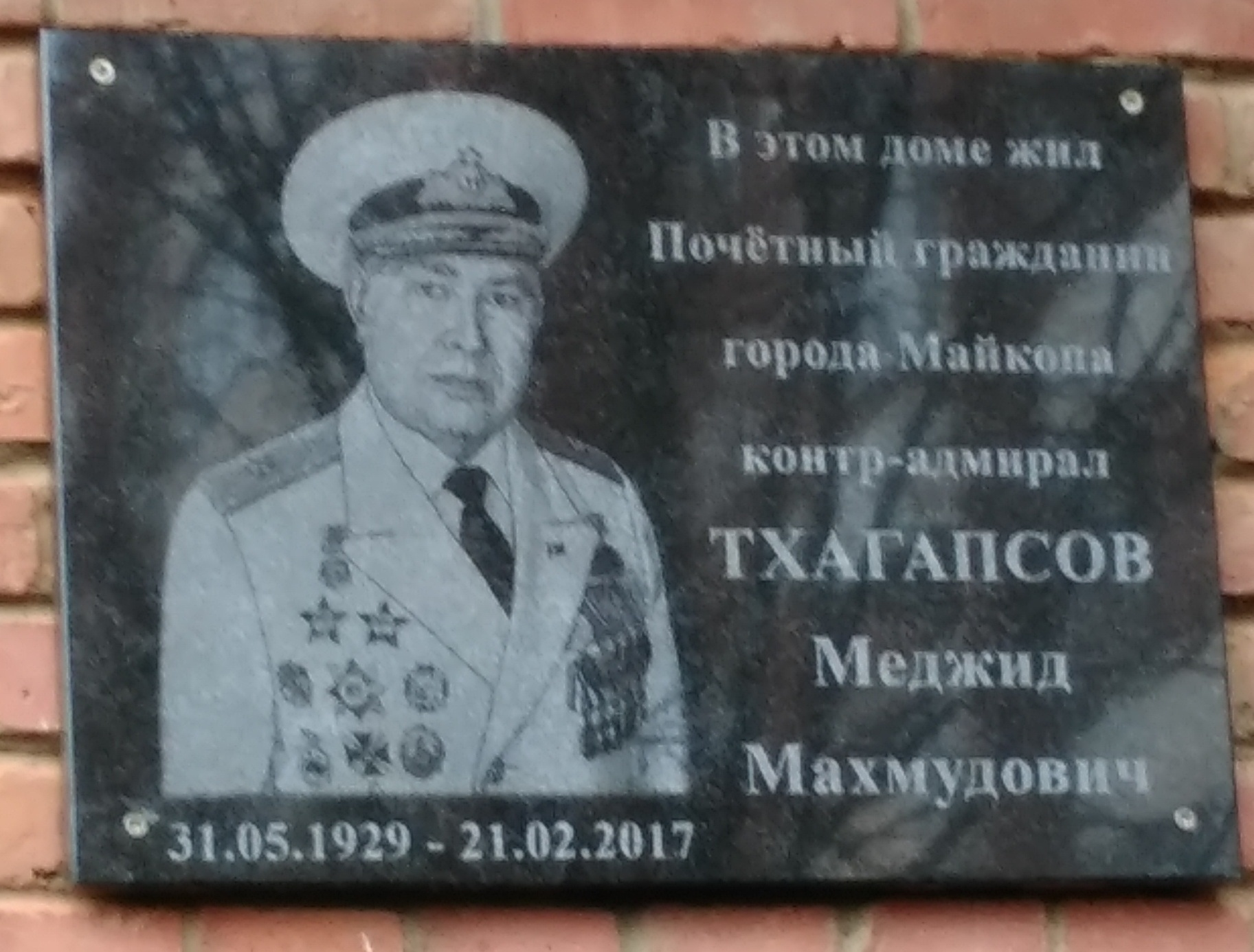 Мемориальная доска контр-адмиралу Тхагапсову М. М открыта 23.1.18 на доме в Майконе,где он жил.